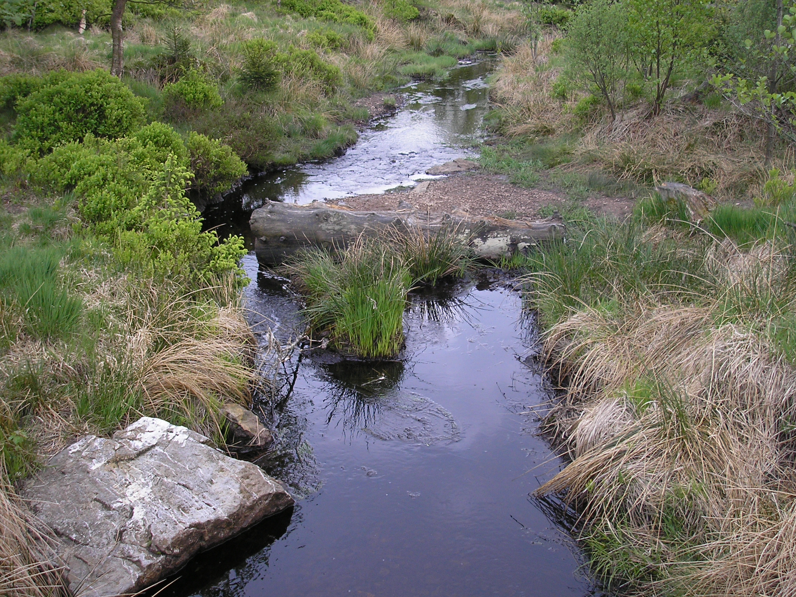 Polleurbach, Polleurvenn, East Belgium